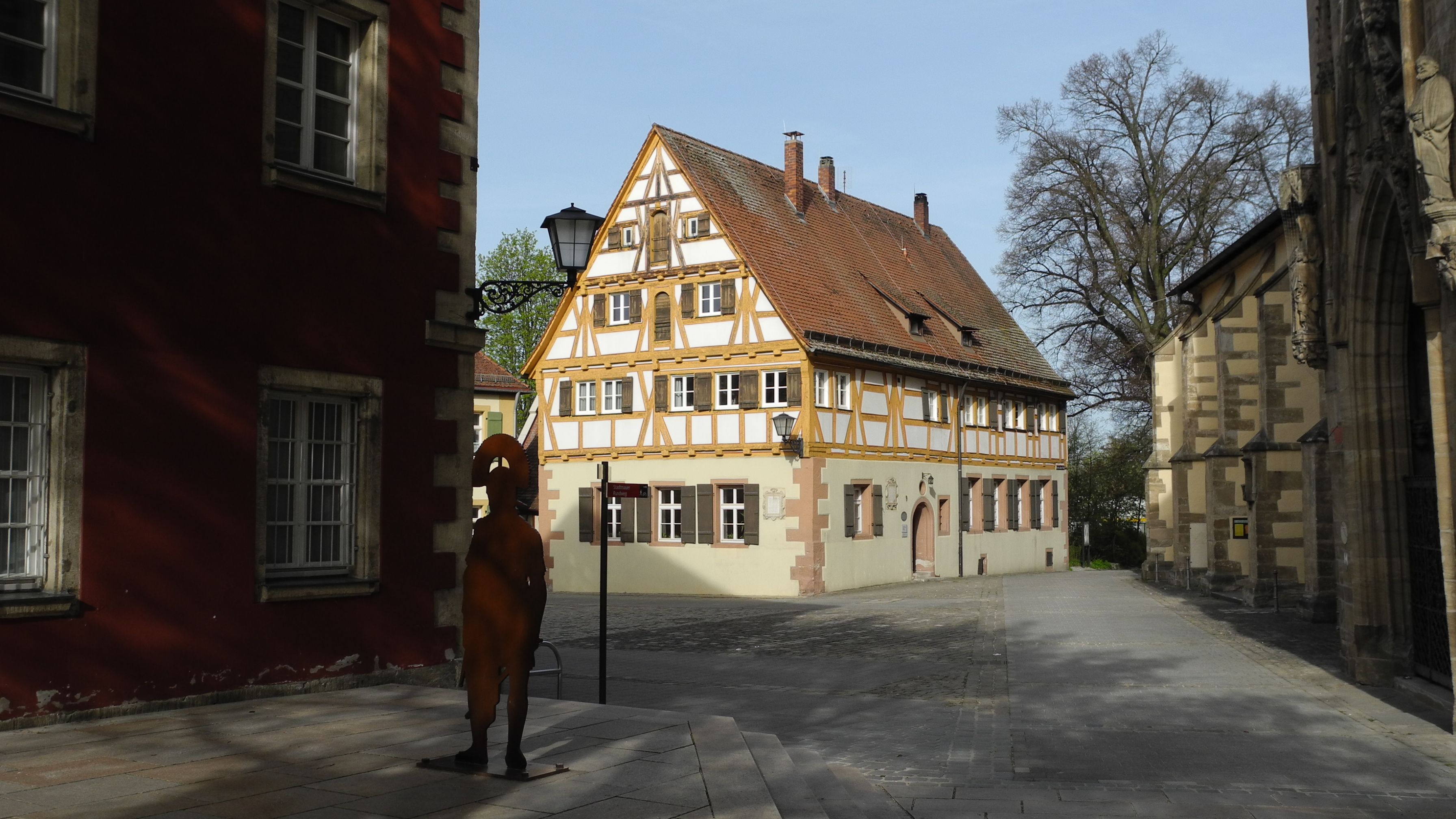 Weißenburg -Fachwerk Alte Lateinschule 1580